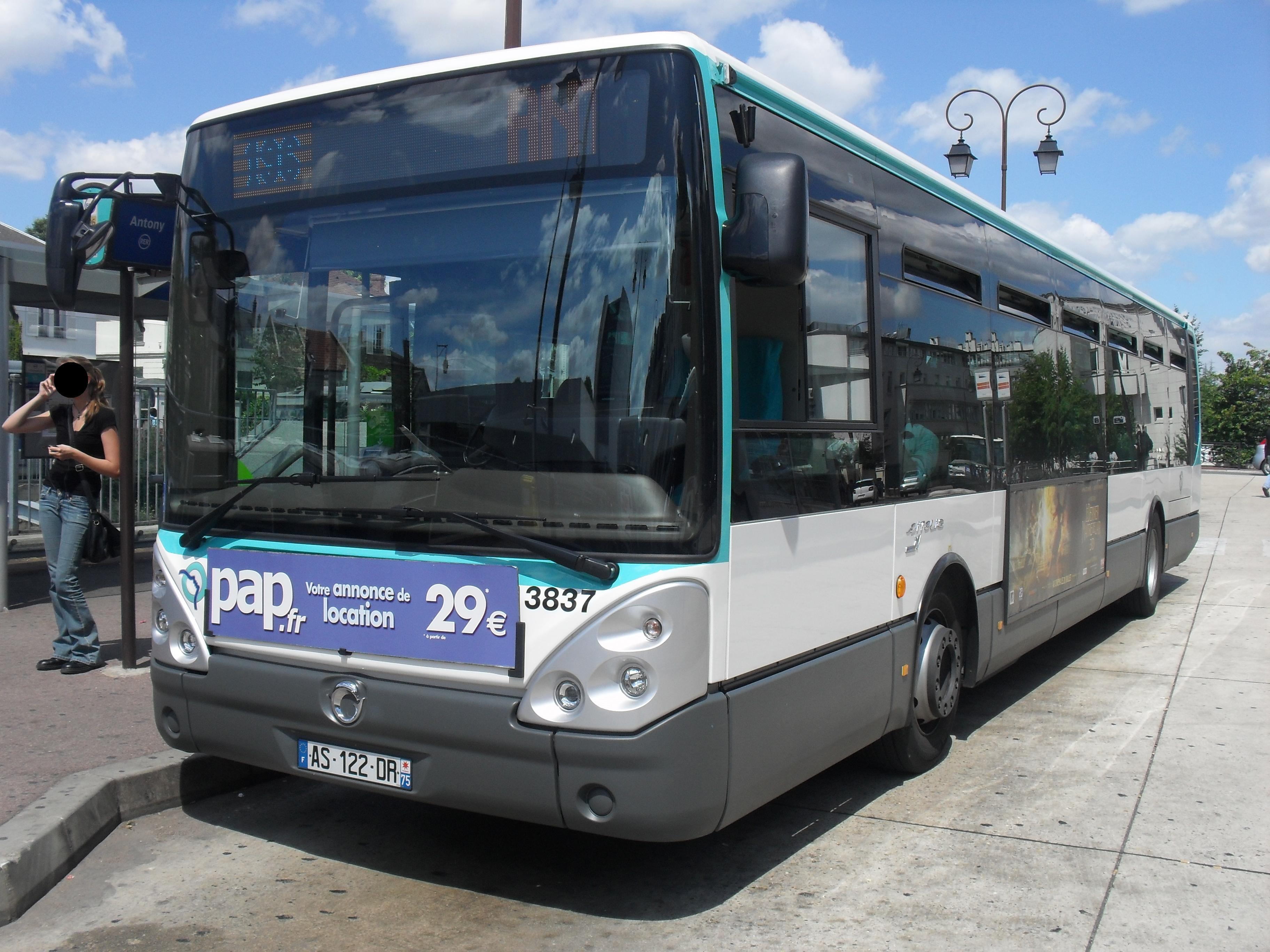 Ligne RATP 196